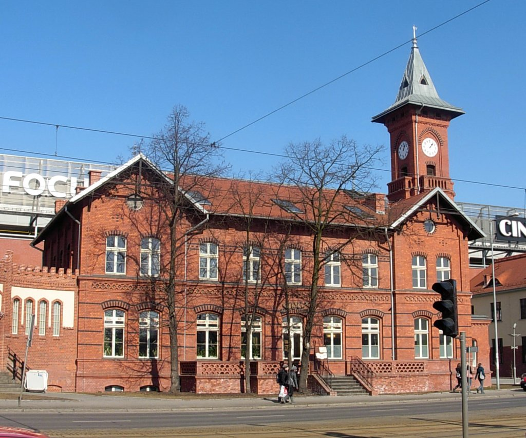 Budynki administracyjne dawnej Rzeźni Miejskiej w Bydgoszczy, Carl Meyer 1890-1910